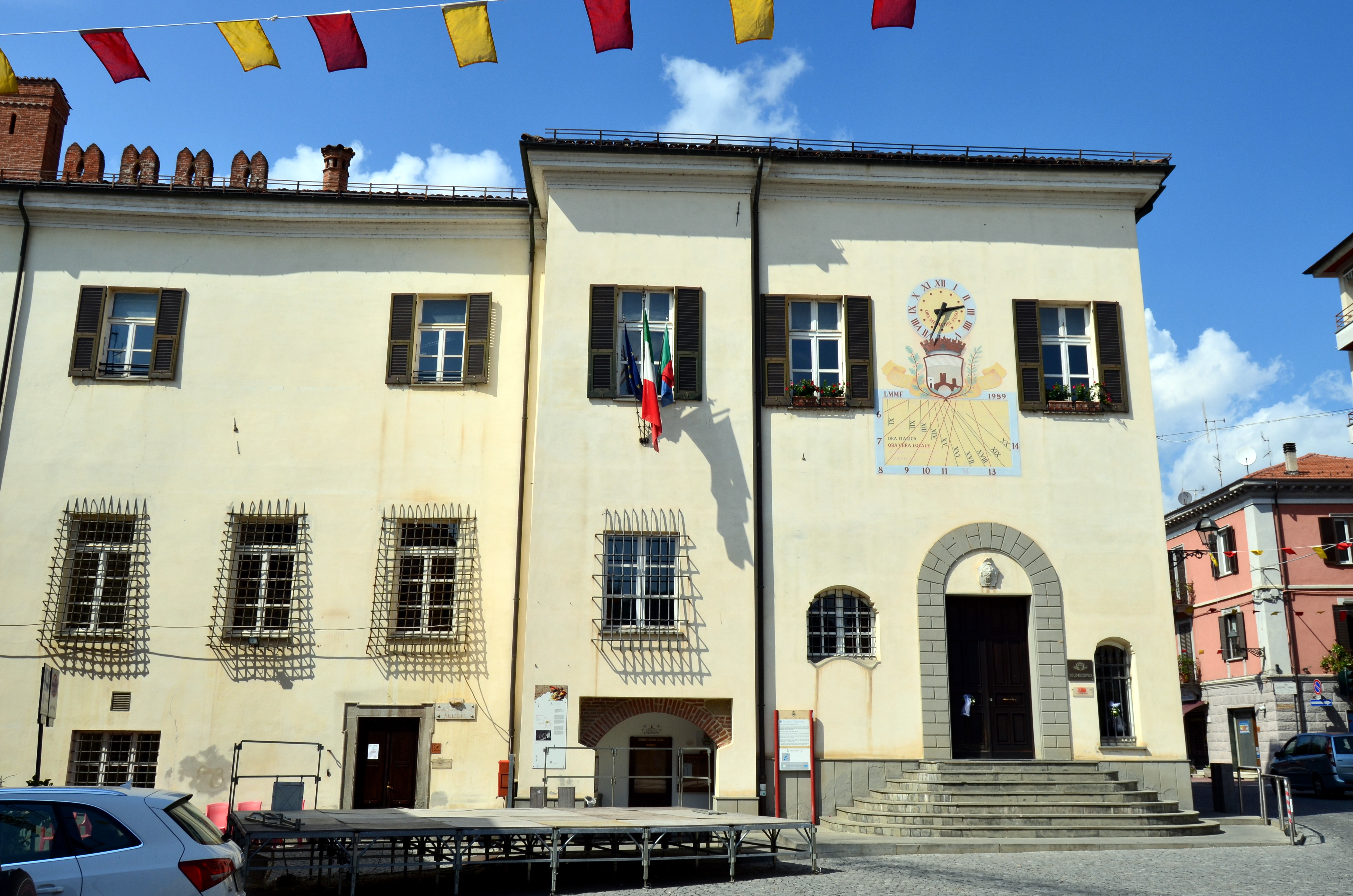 Palazzo comunale di Millesimo, Liguria, Italia